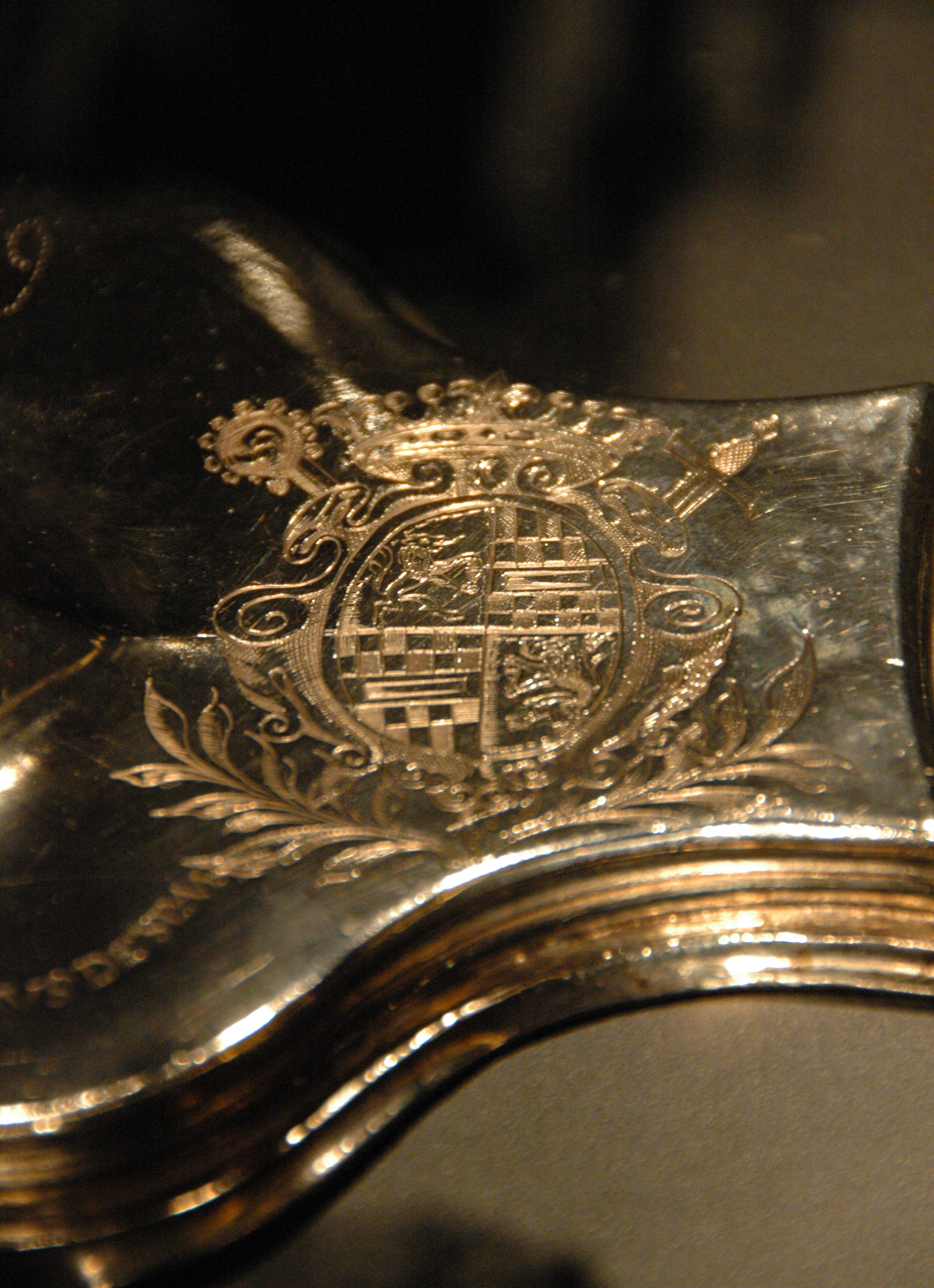 Das Wappen der Essener Äbtissin Maria Clara von Spaur, Pflaum und Vallier auf dem Fuß des Cosmas-Damian-Reliquiars aus dem Essener Domschatz